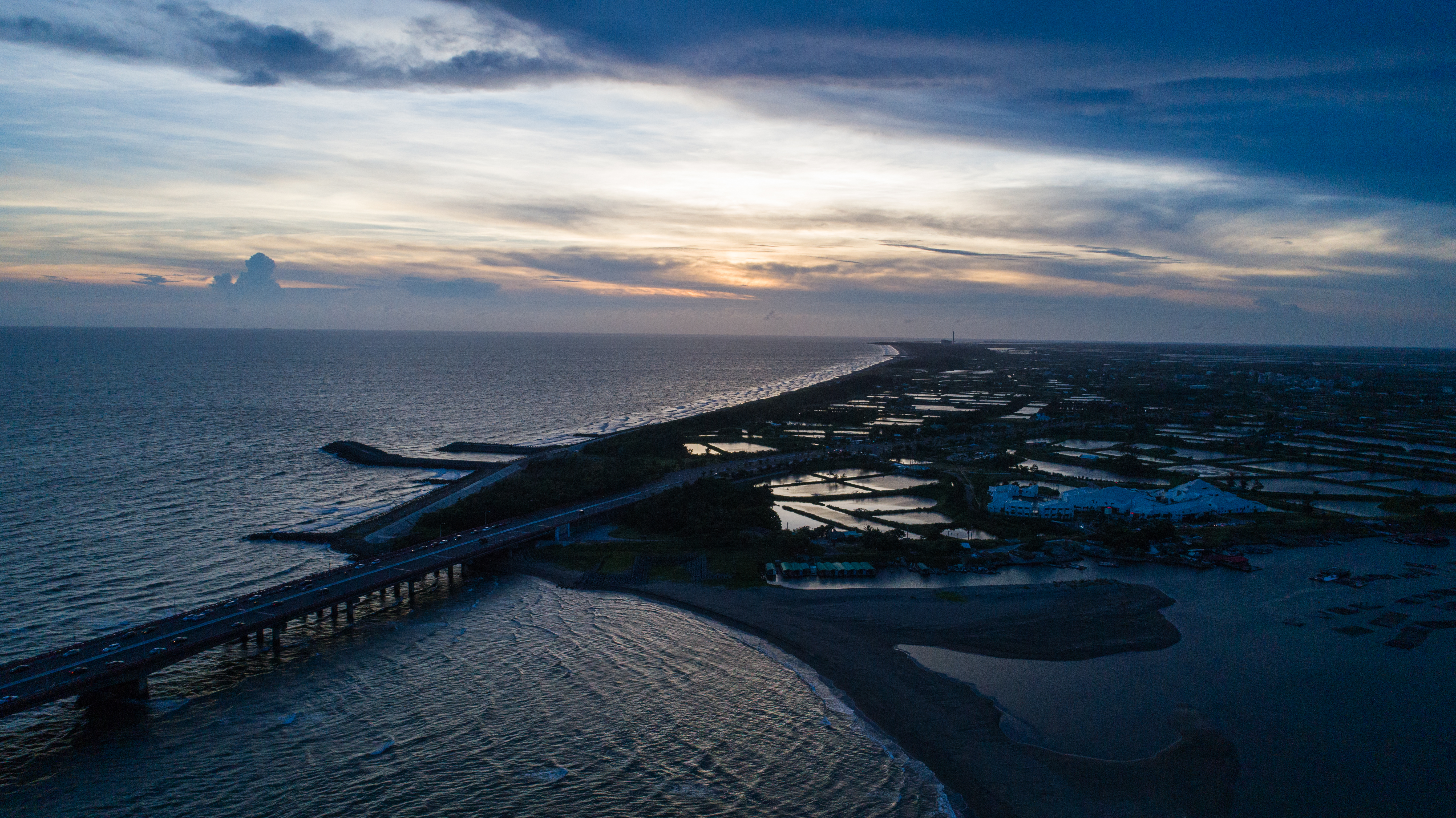 中文（台灣）: 四草大橋、台江國家公園、鹽水溪